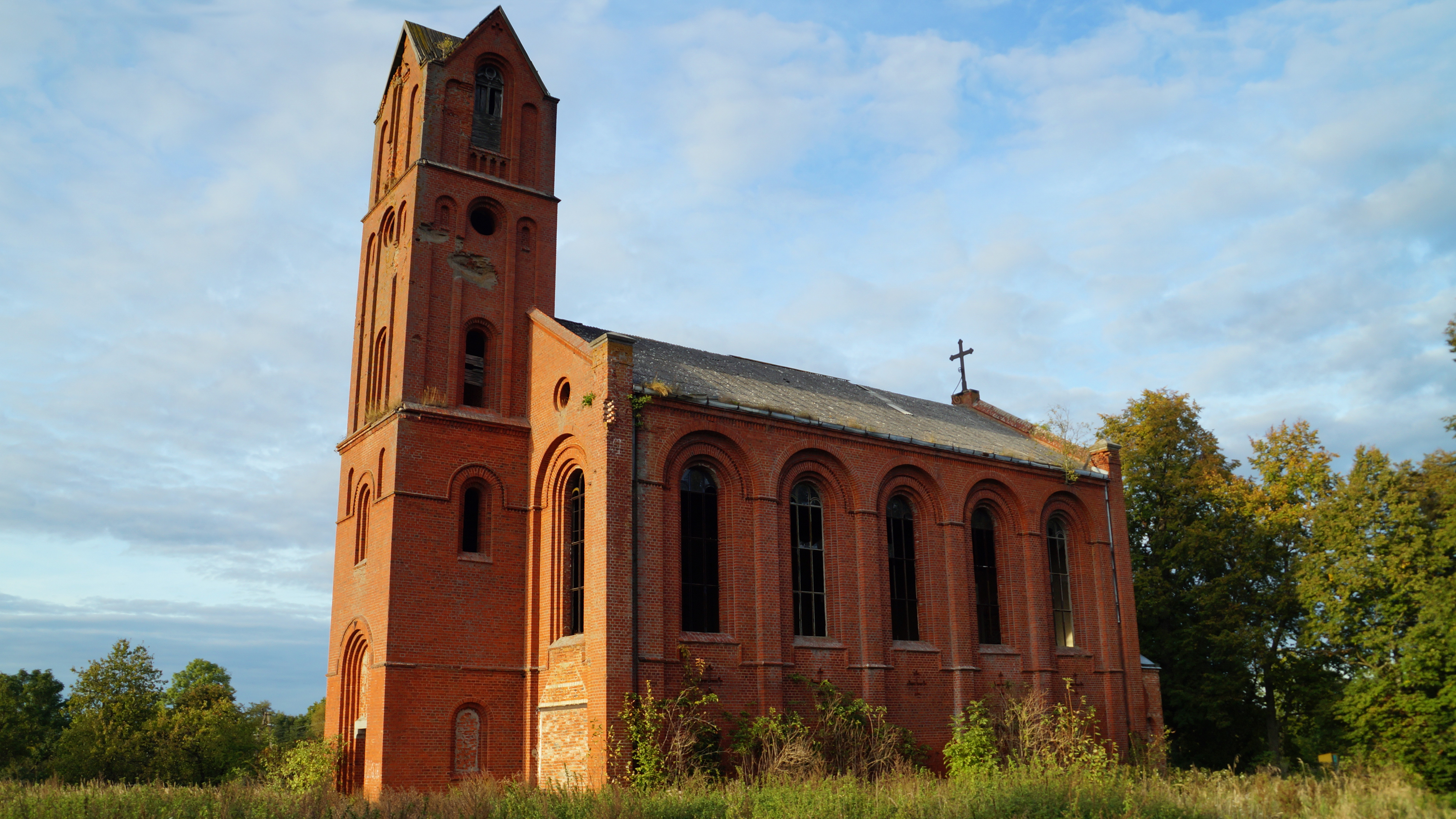 Кирха Патерсвальде: улица Центральная, 12, Большая Поляна, Гвардейский район, Калининградская область